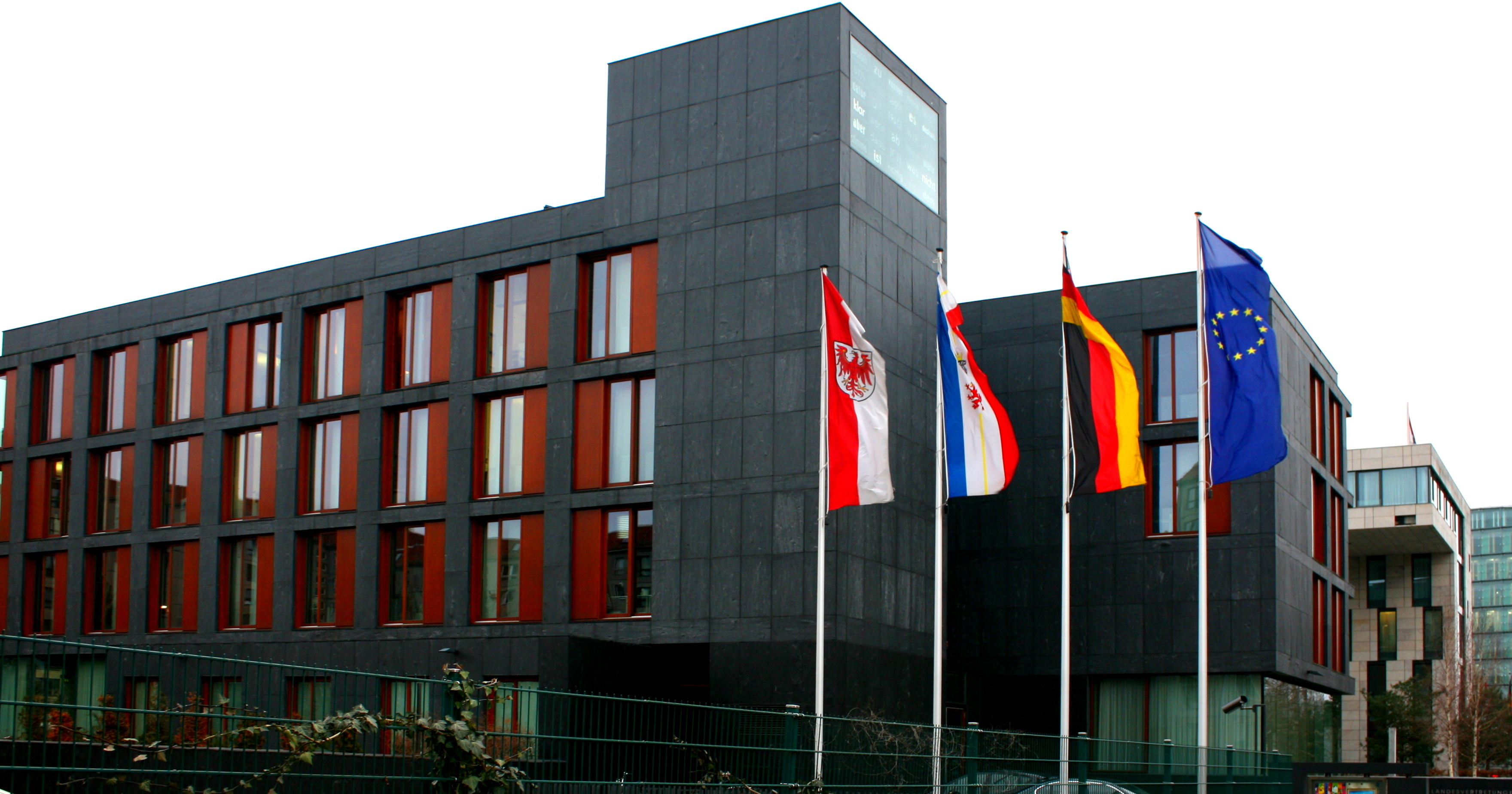 Gebäude der Ländervertretungen Brandenburgs und Mecklenburg-Vorpommerns beim Bund in den Ministergärten in Berlin